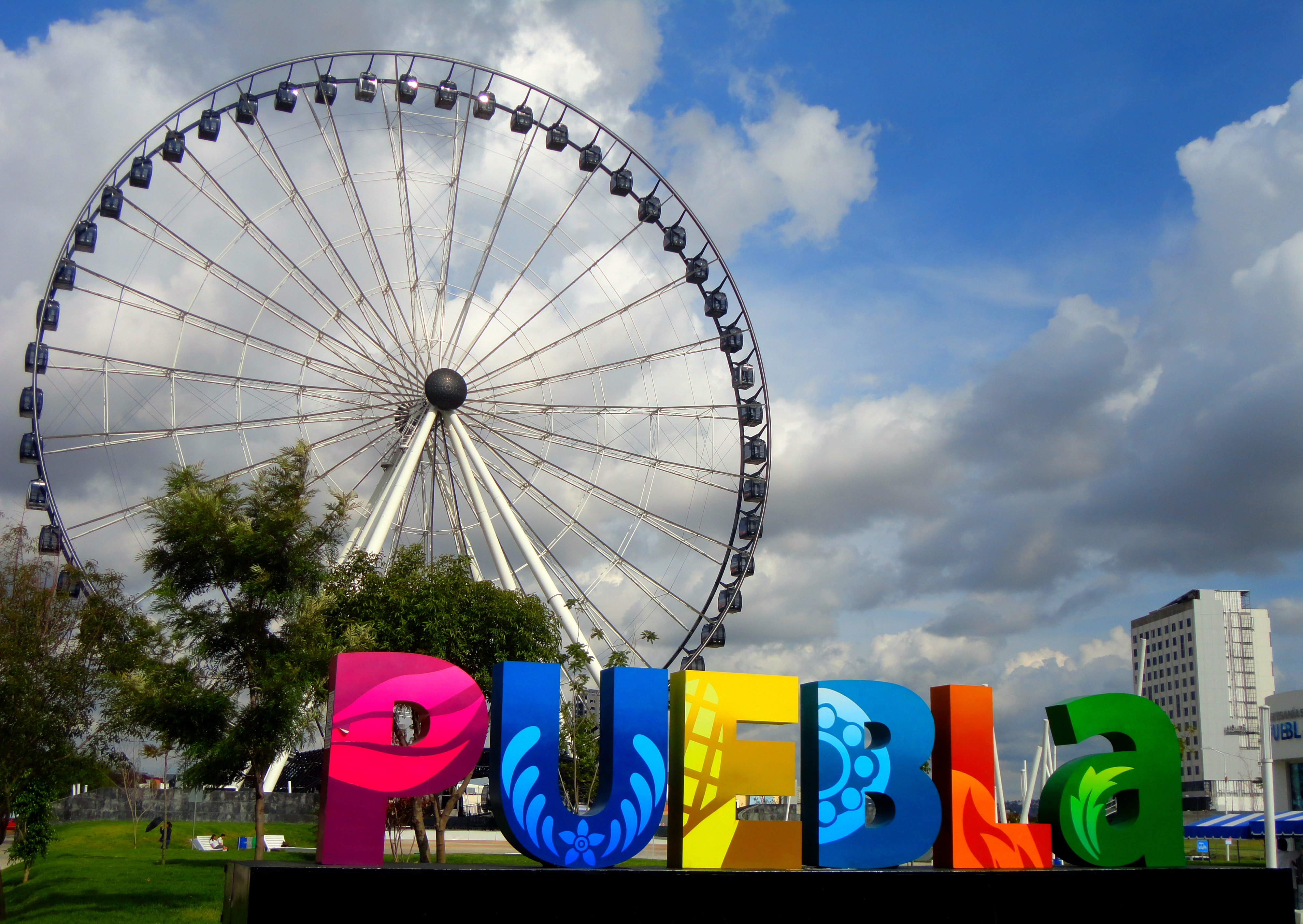 La Estrella de Puebla en la ciudad de Puebla de los Ángeles, México.